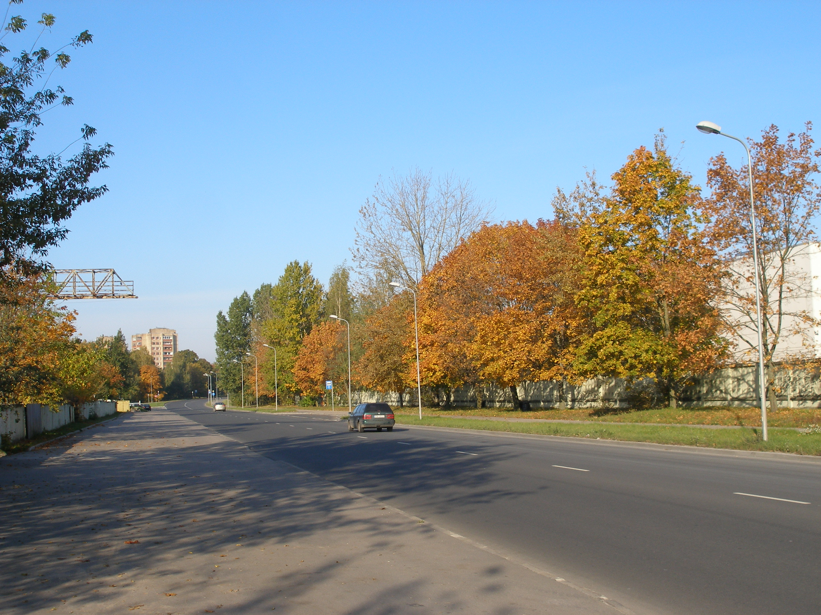 Ezermalas iela Rīgā pie TEC I. Fotografējis Jānis Vilniņš (scAvenger) 2008. gada 5. oktobrī.